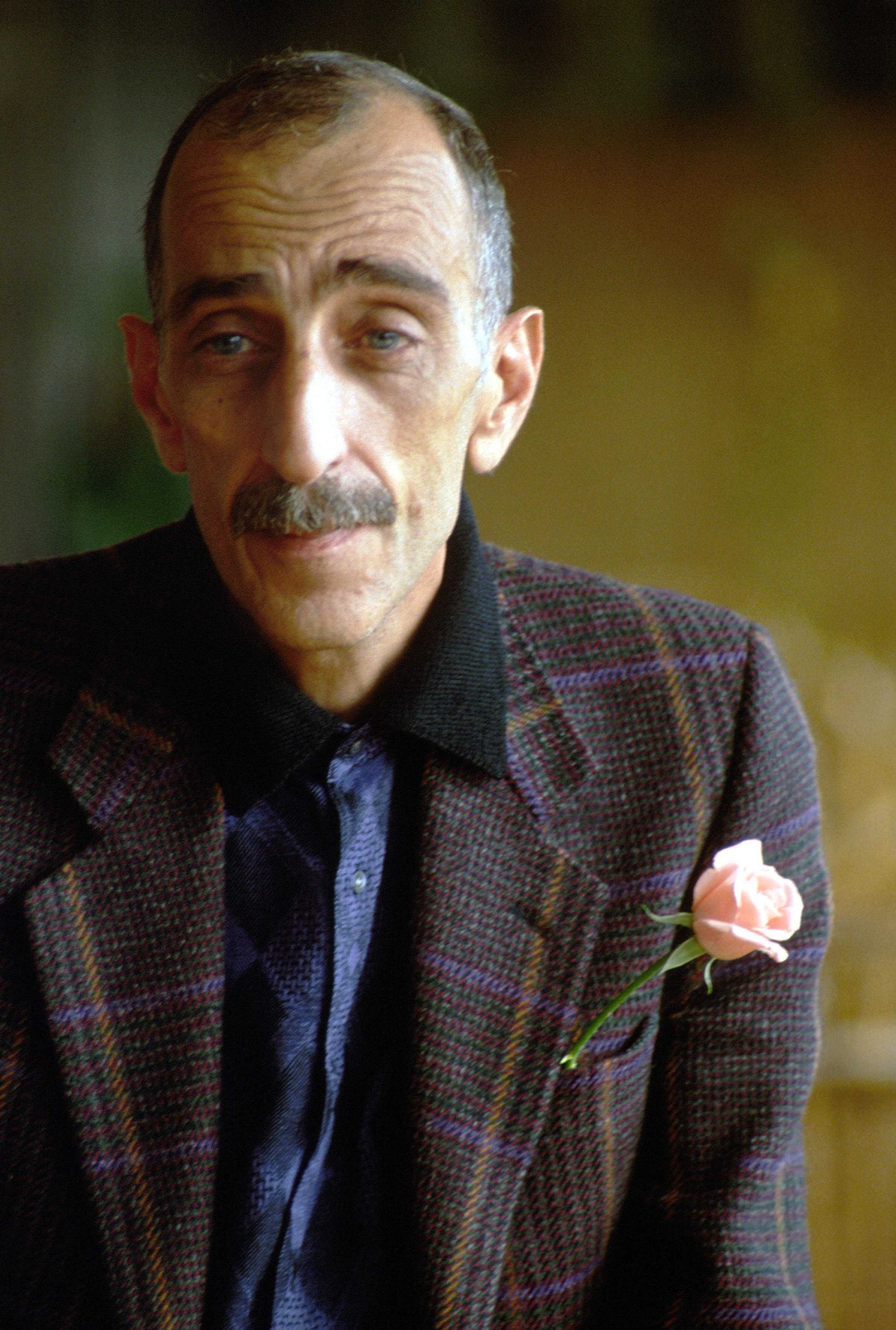 Il regista portoghese Joao Cesar Monteiro